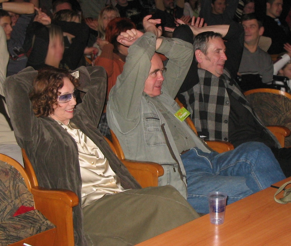 Olga Lipińska, Stanisław Tym i Władysław Sikora na Festiwalu Kabaretu w Zielonej Górze. Grudzień 2005